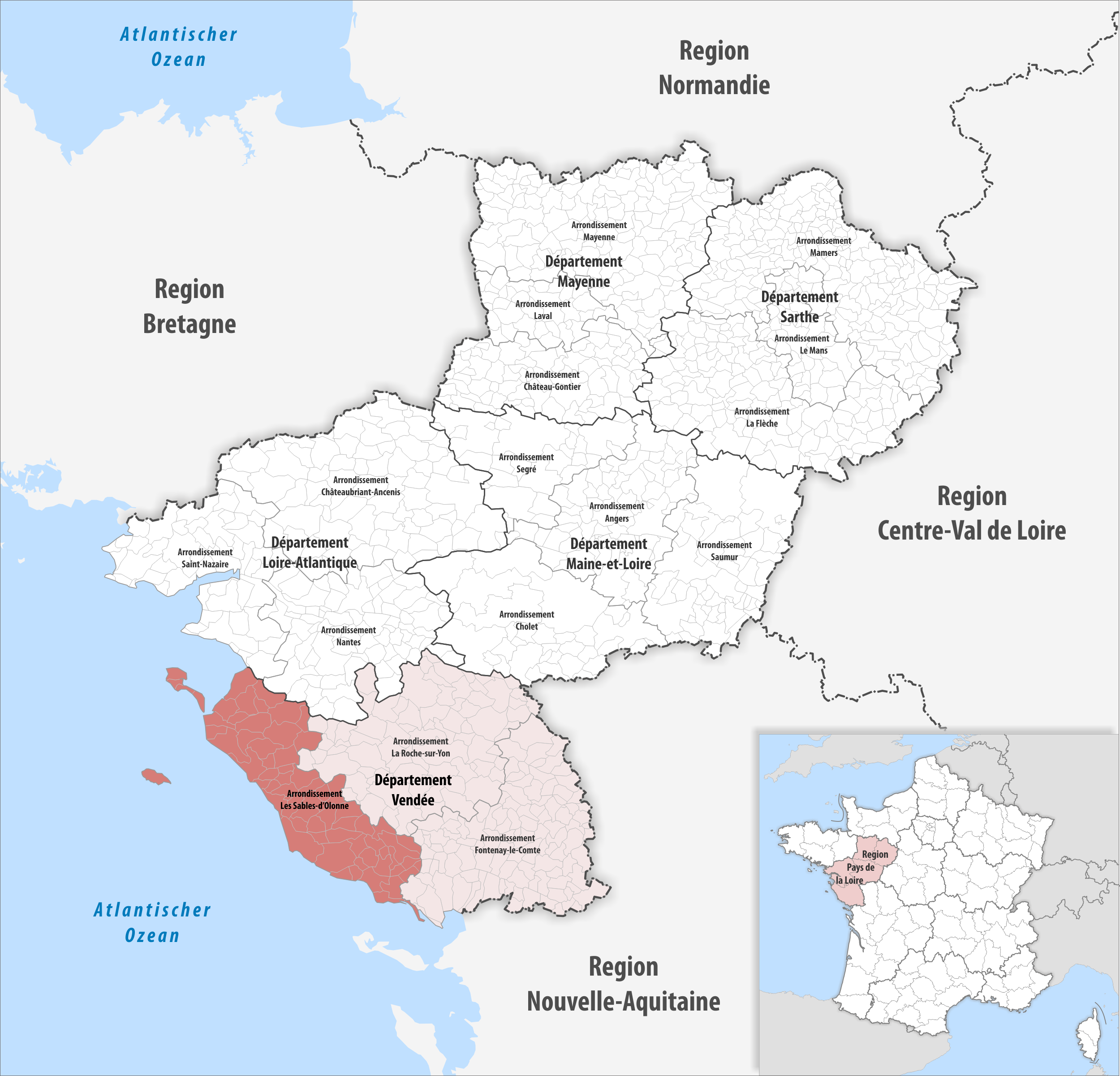 Lage des Arrondissements Les Sables-d’Olonne